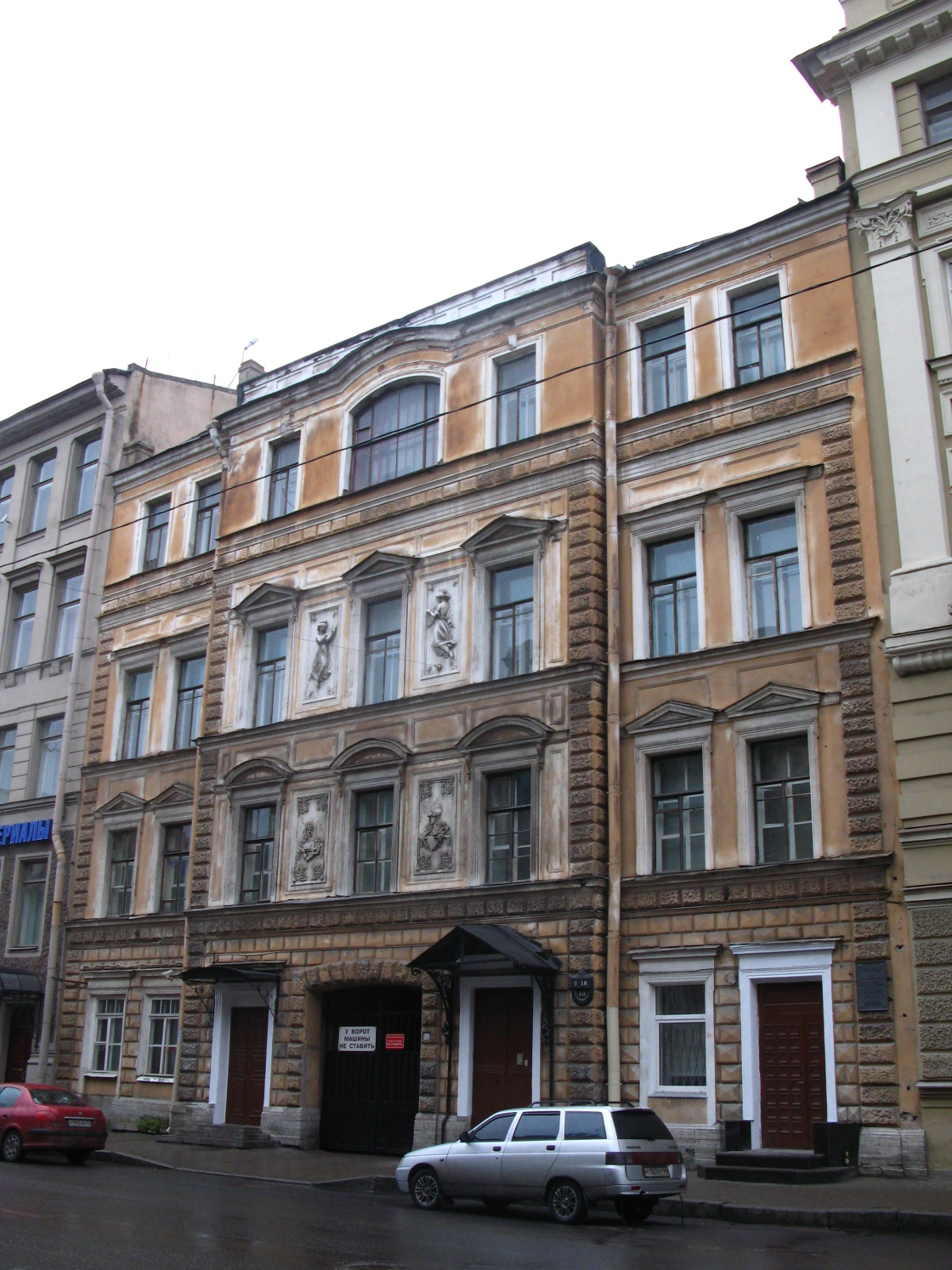 Фасад дома по Миллионной, д.10